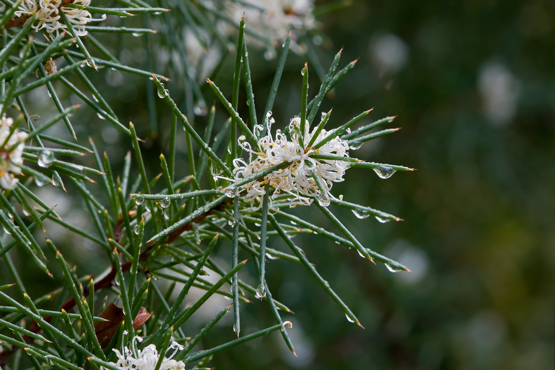 1.2 only